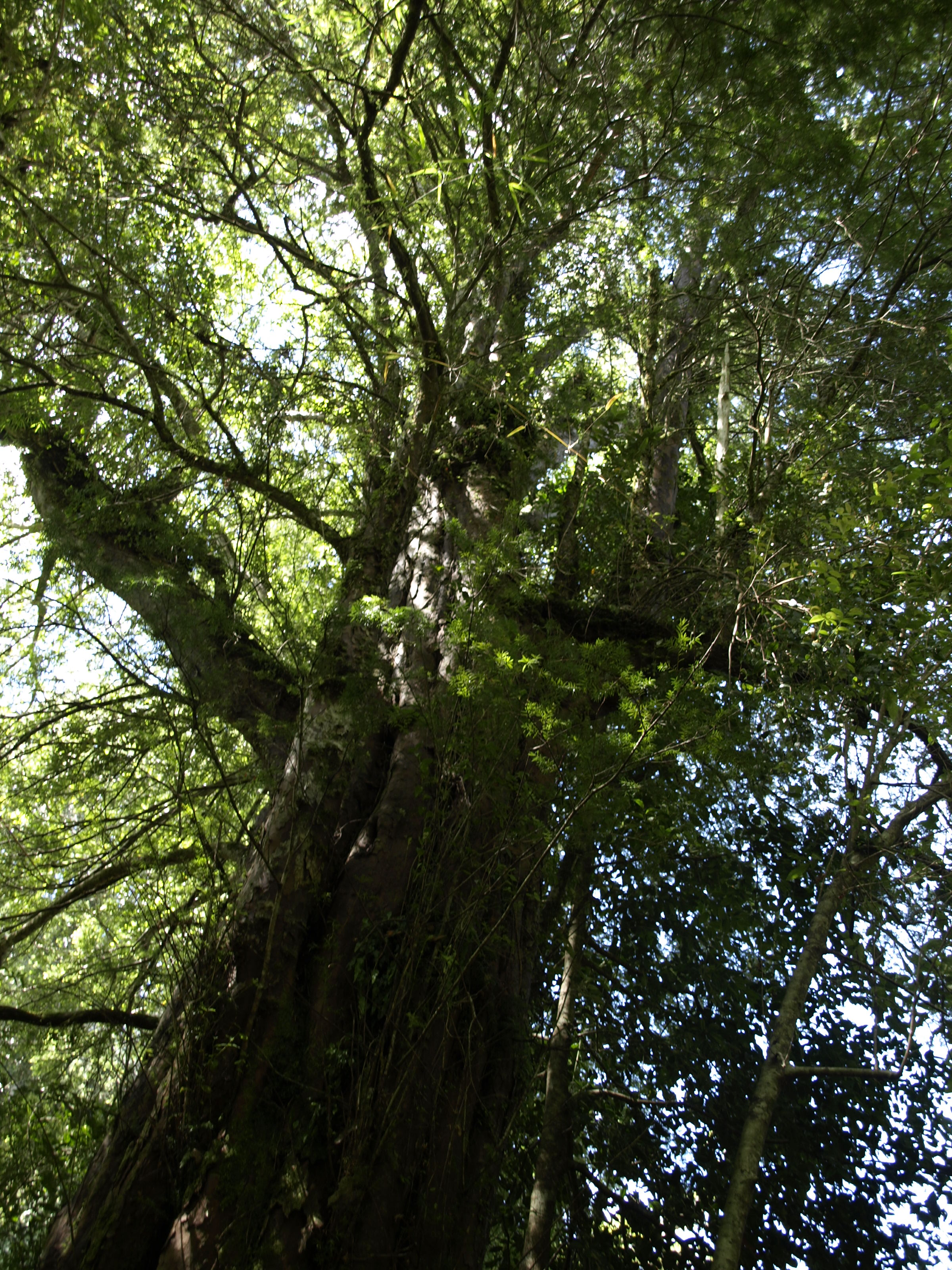 Saxegothaea conspicua, Parque Nacional Alerce Andino, Chile.